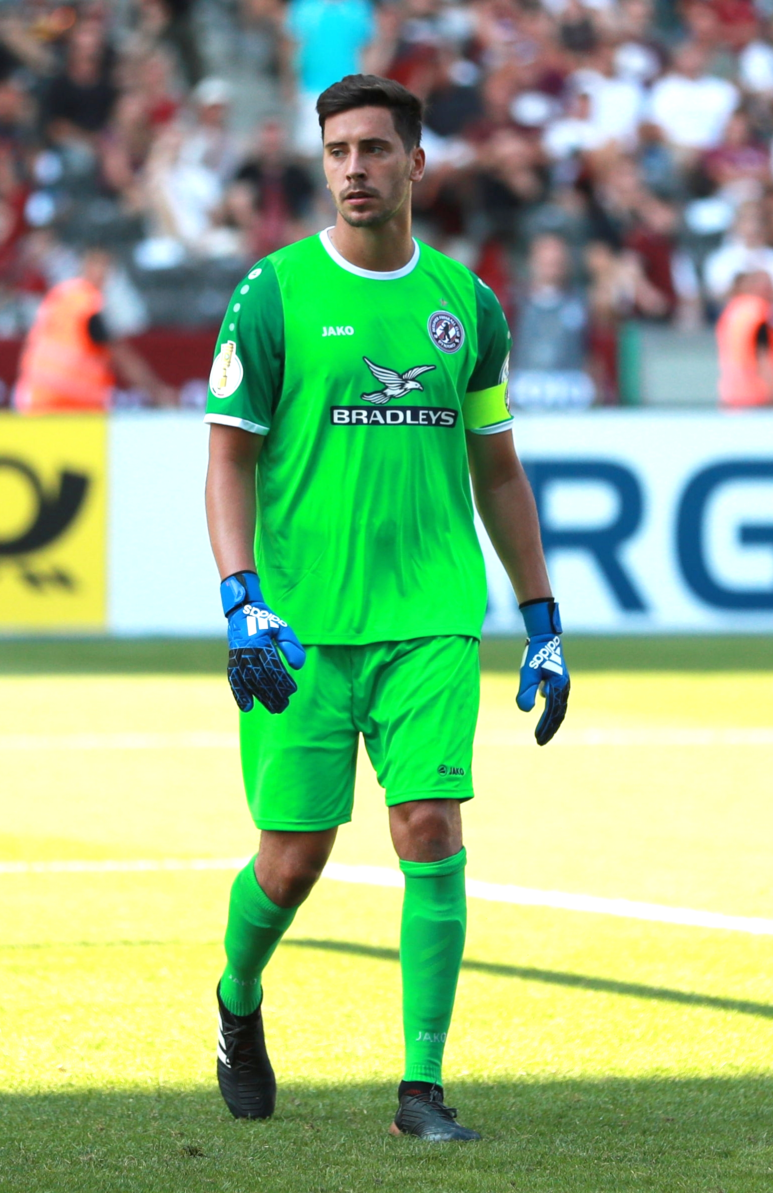 DFB-Pokal 2018/19, 1. Hauptrunde: BFC Dynamo gegen 1. FC Köln 1:9 (1:4)